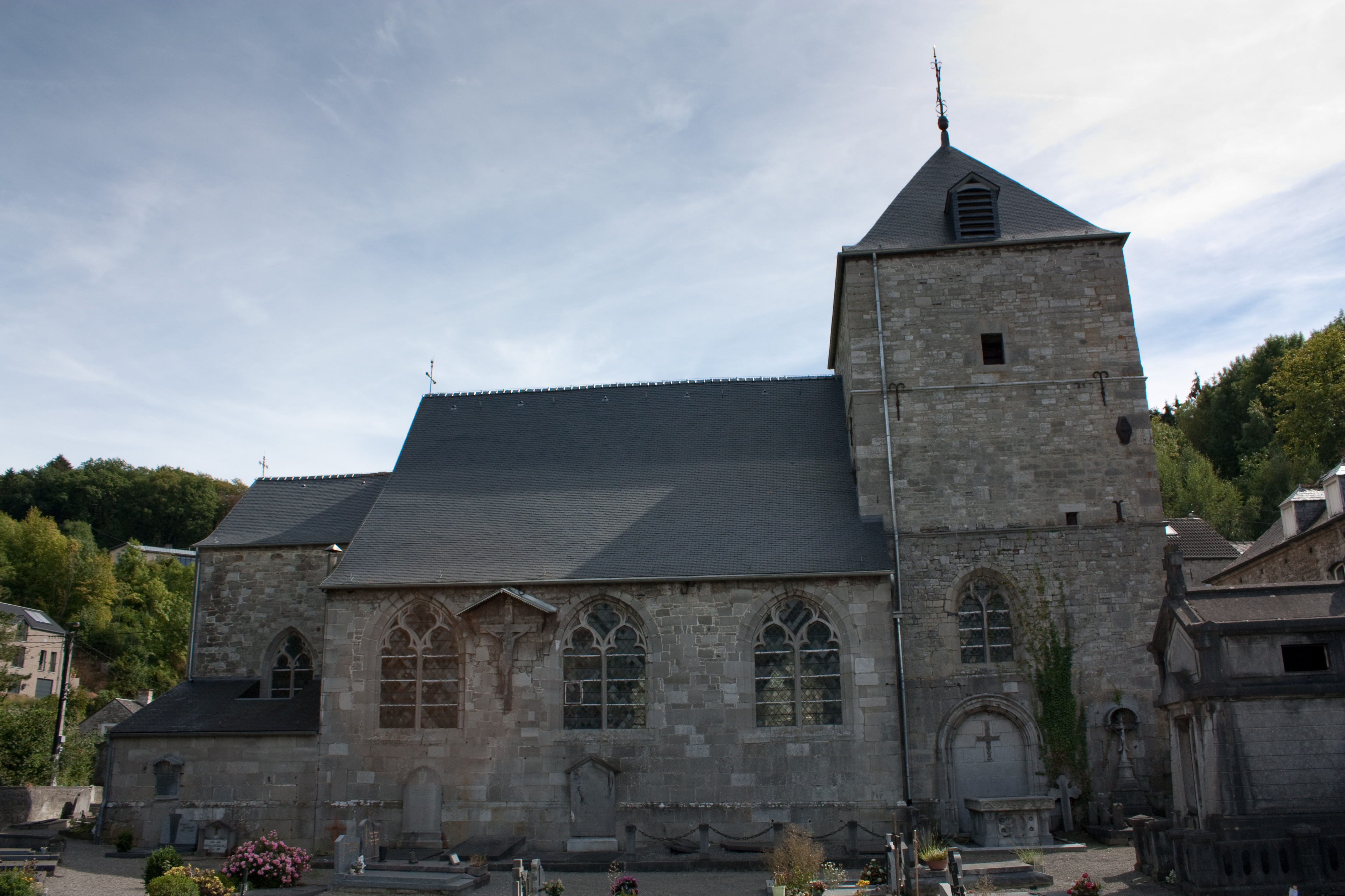 L'église Saint-Quentin, à Lives-sur-Meuse